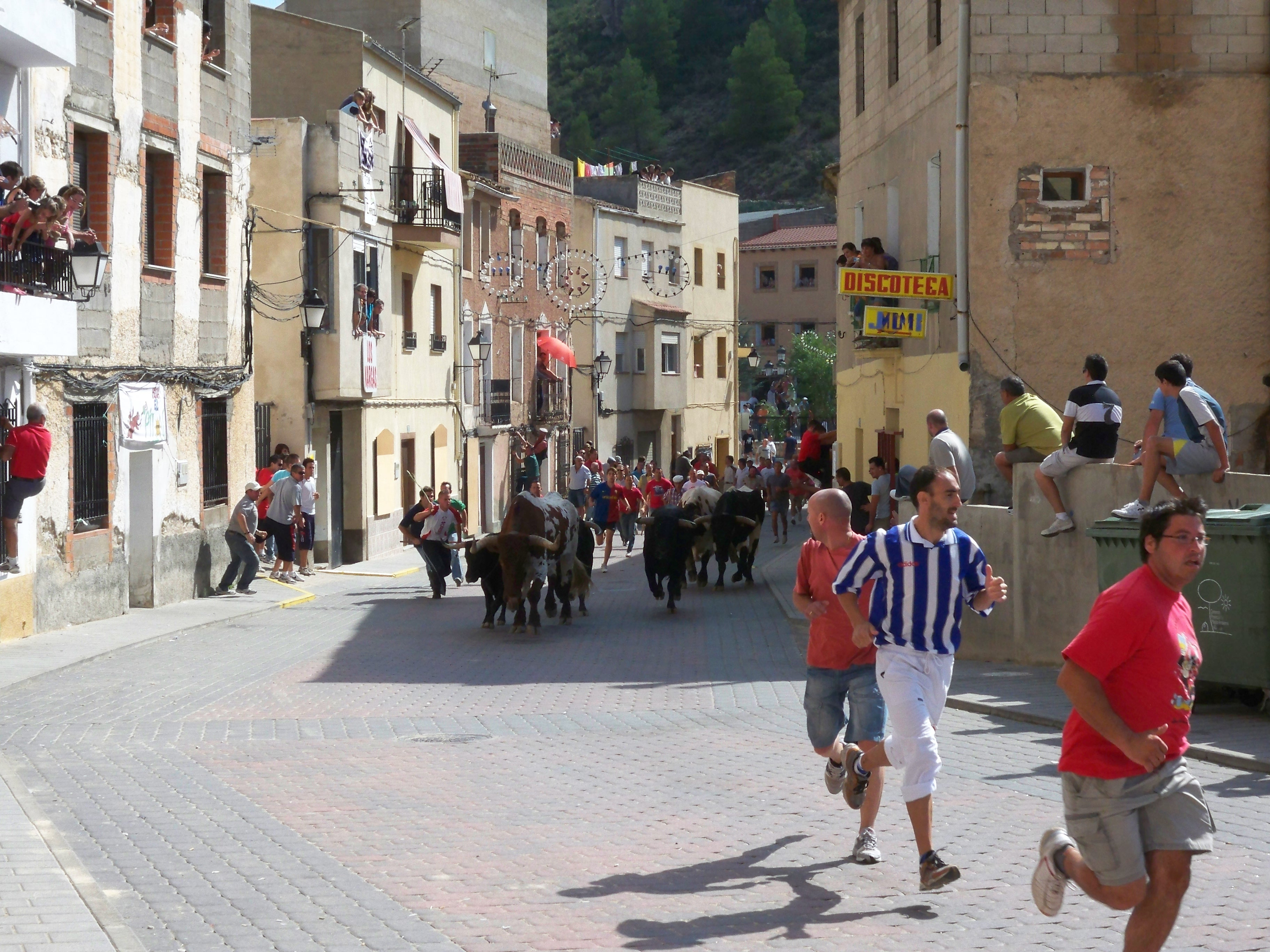 Fotografía de la calle Mayor de Molinicos durante uno de los encierros de septiembre